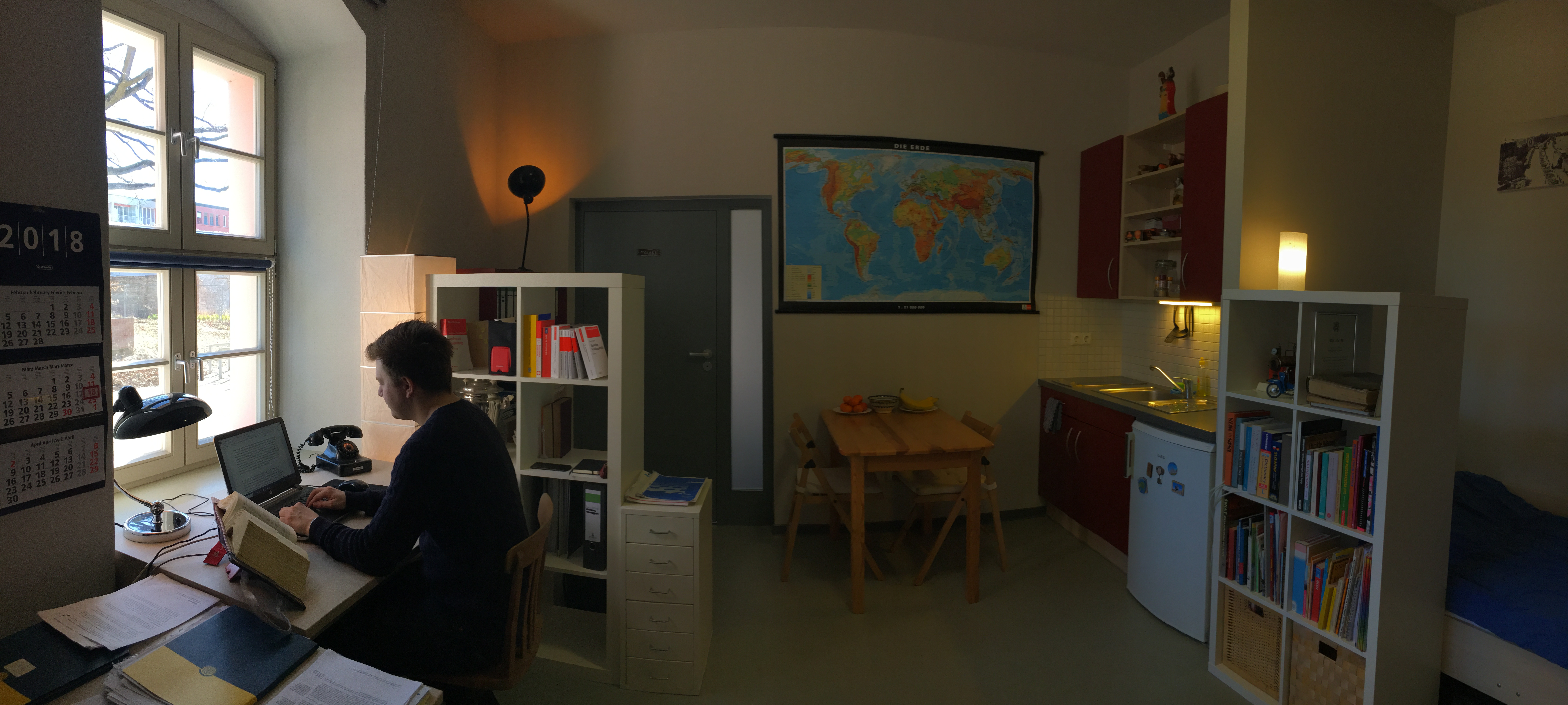 Max-Kade-Haus Frankfurt (Oder) von Innen